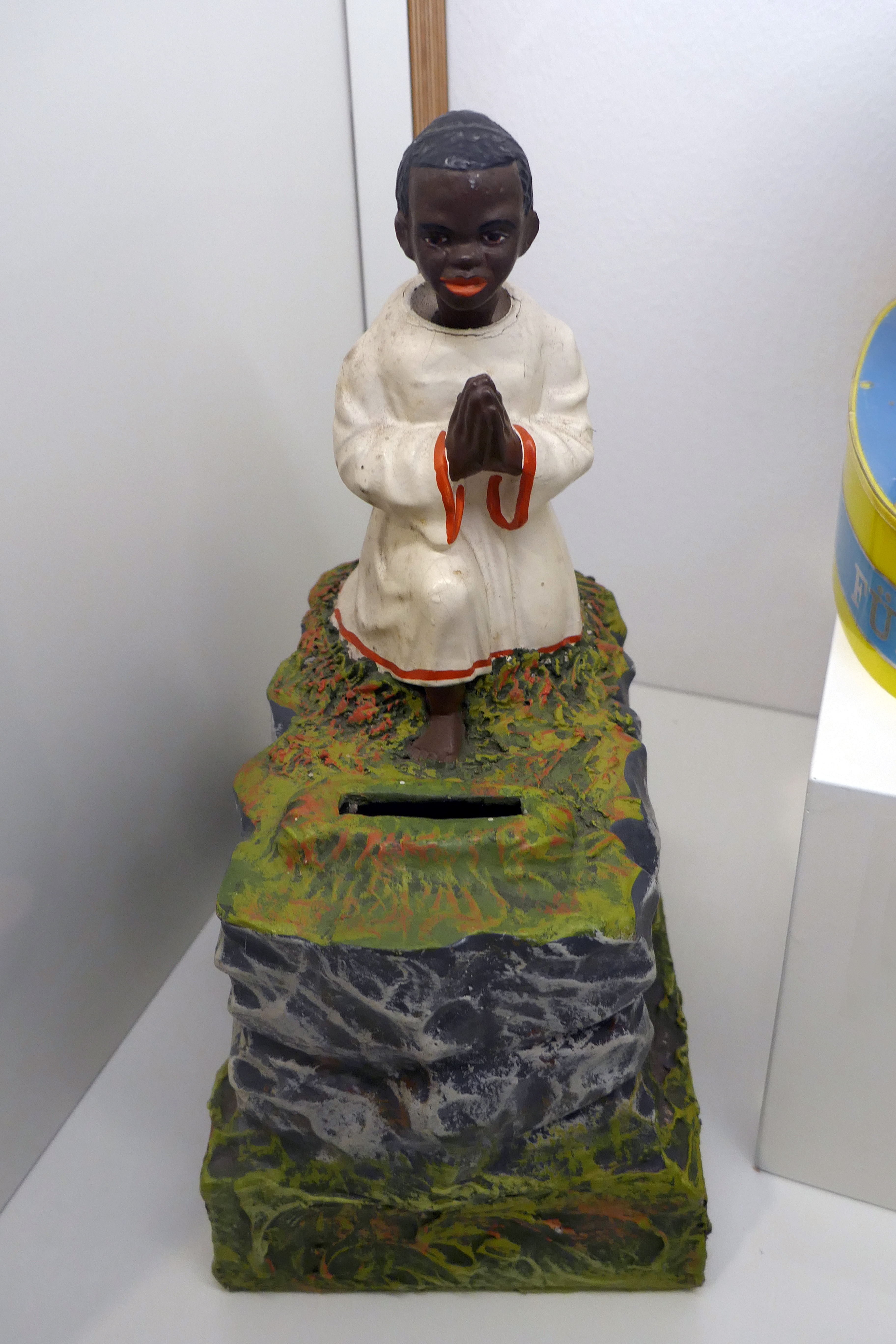 Missionssammelbüchse Nickneger Um 1910 Pappmaché, farbig gefasst Museum im Ritterhaus (Offenburg). Ein Fenster zur Welt. Die kolonialzeitliche Sammlung. Leihgabe KirchengemeindeMariä Krönung (Lautenbach)